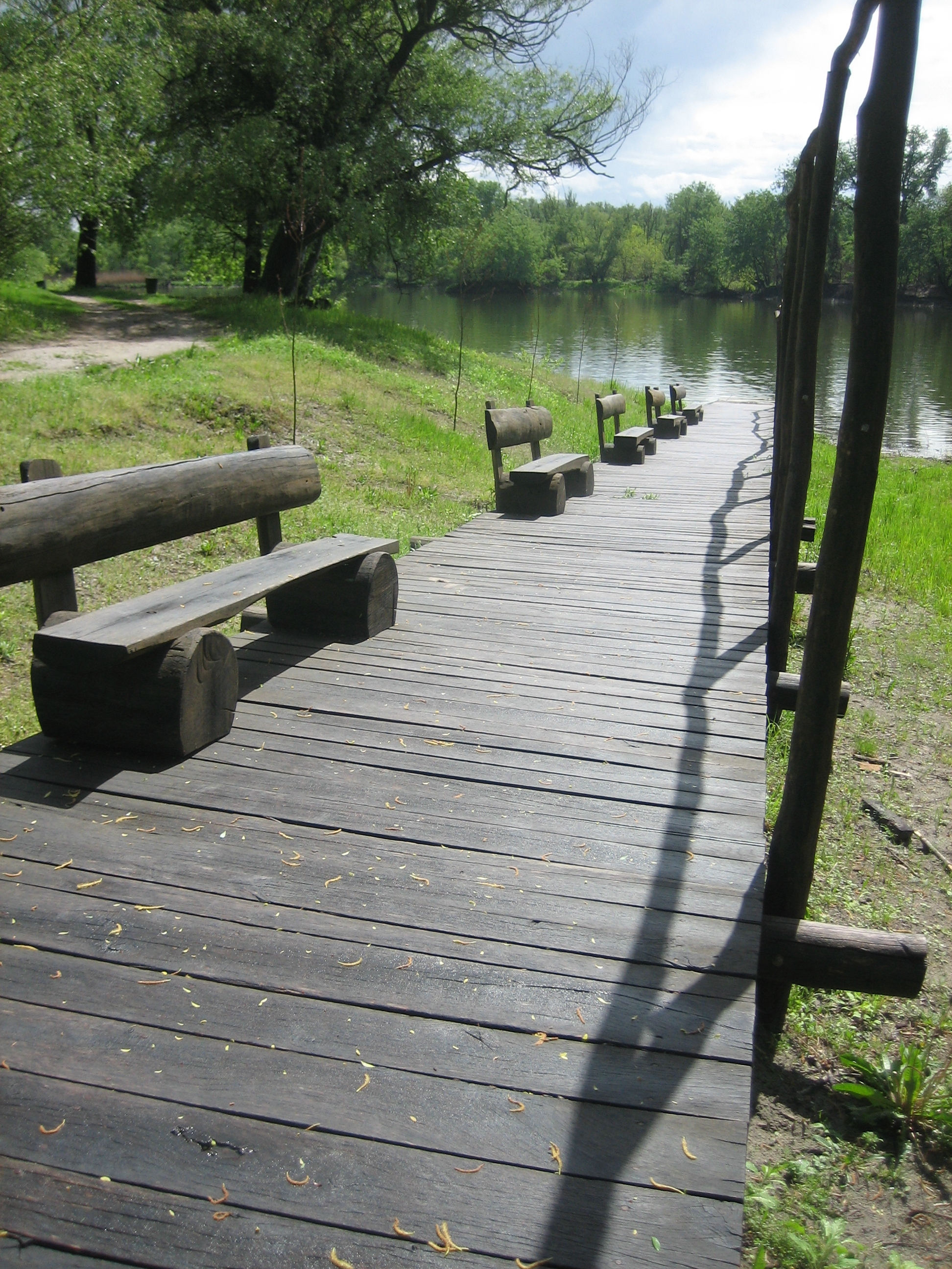 Kopački rit, a nature park in Baranja, eastern Croatia / Park prirode Kopački rit u Baranji.